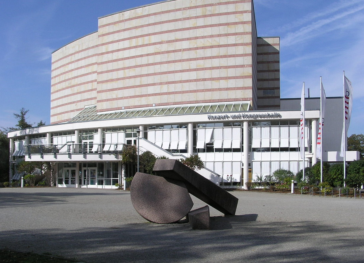 Bamberg: Konzert- und Kongresshalle Fotograf: Richard Schubert ja:??:Konzert- und Kongresshalle.jpg